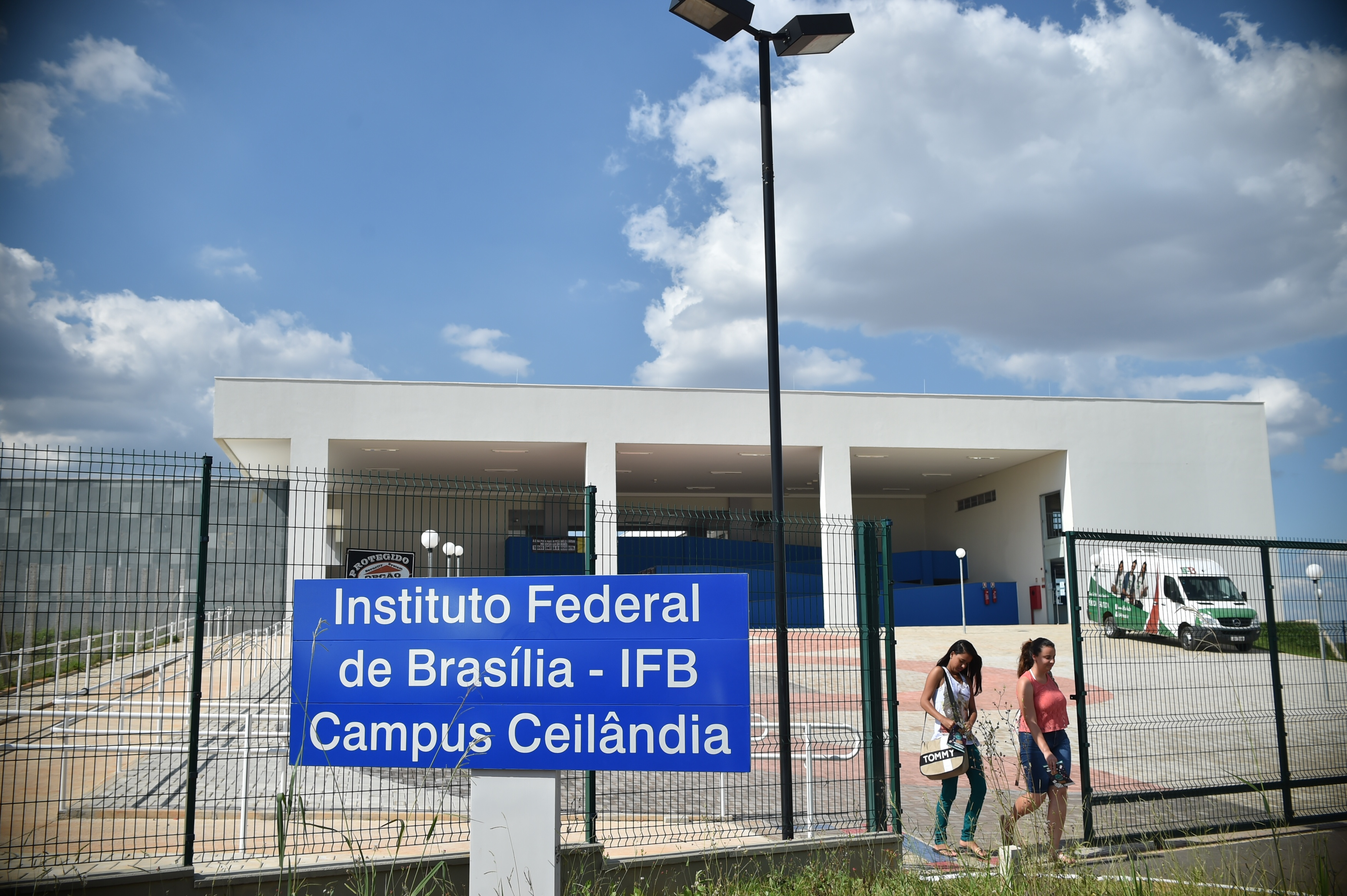 EQNP 26/30, Ceilândia, Brasília, DF, Brasil 7/4/2016 Foto: Andre Borges/Agência Brasilia O governador Rodrigo Rollemberg participou do lançamento oficial na tarde desta quinta-feira (8) das atividades do Campus Ceilândia do Instituto Federal de Brasília. Leia a matéria no site da Agência Brasília: bit.ly/1qamLT4